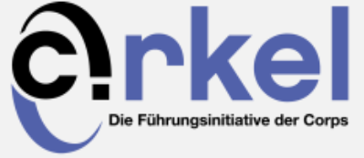 Logo von C!rkel